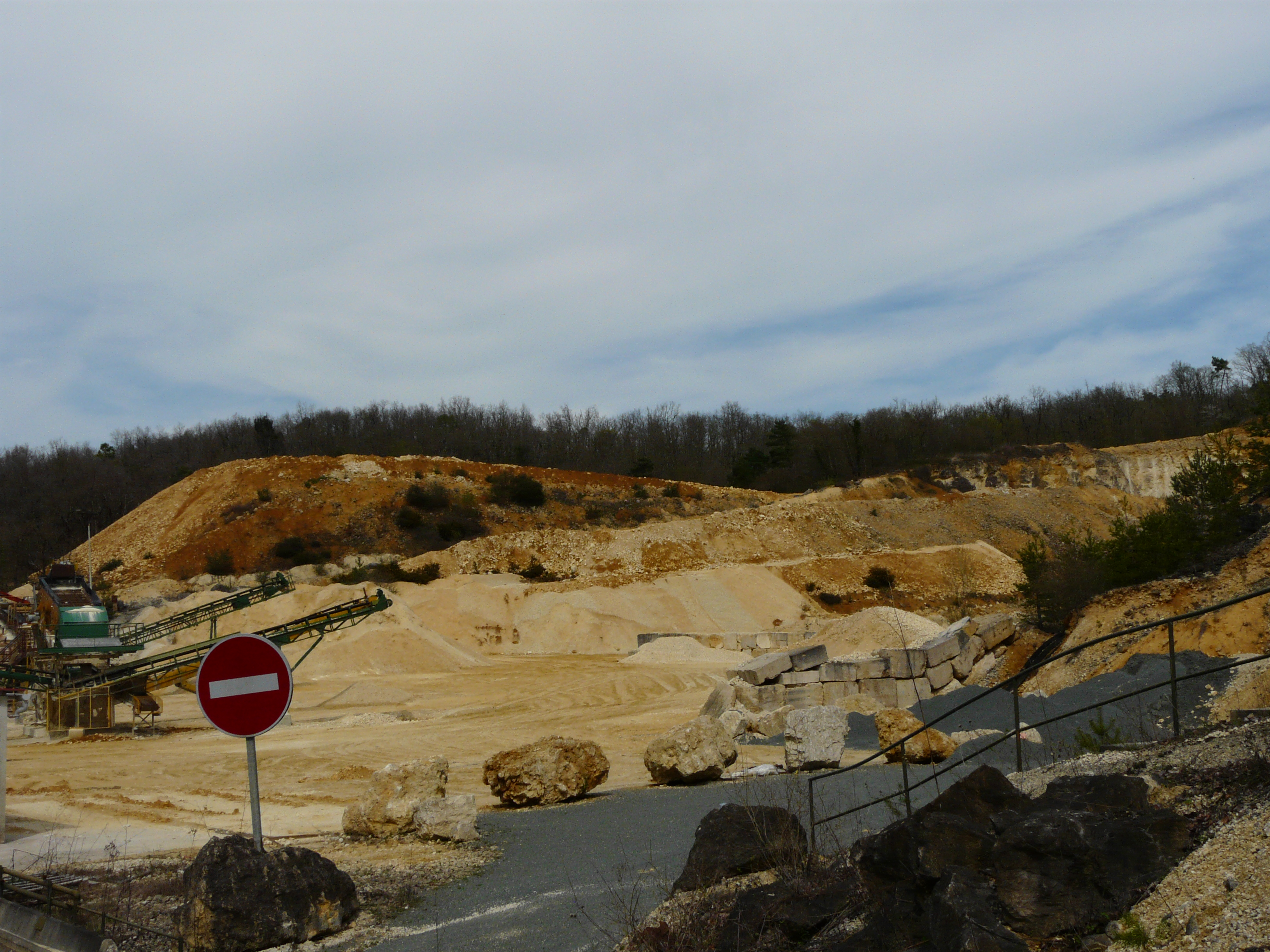 Carrière de calcaire de Chauffour et Puy Pelan, Creyssac, Dordogne, France.